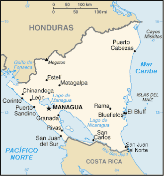 Mapa simplificado de Nicaragua.